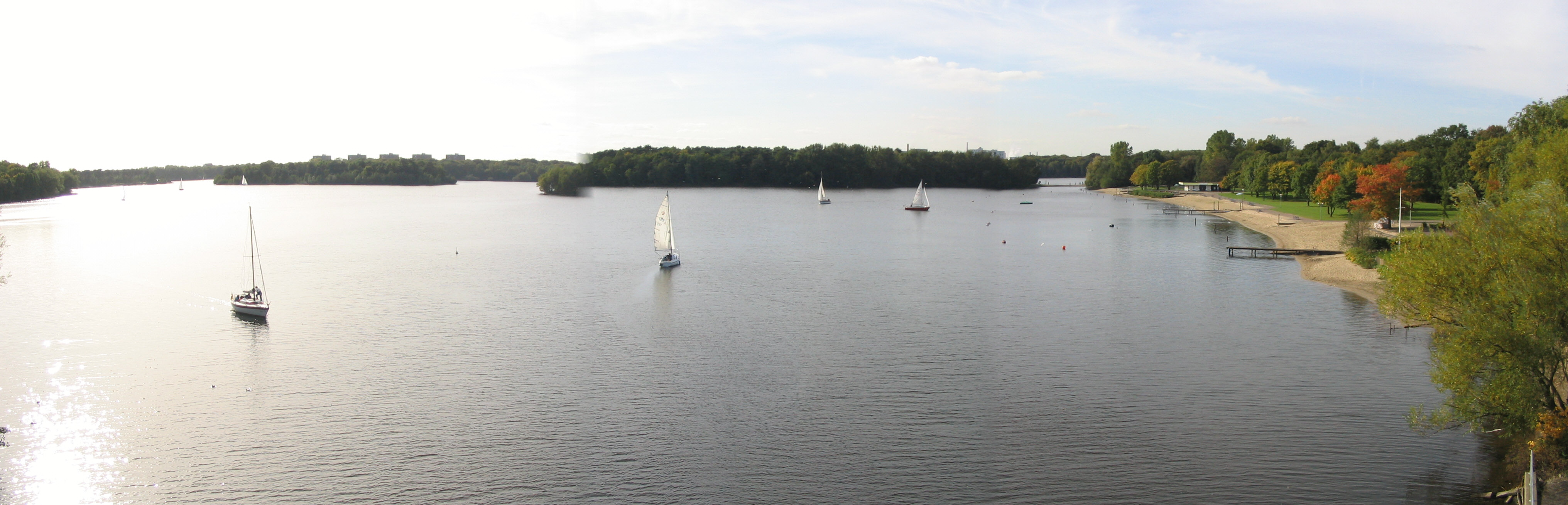 Wolfssee in Duisburg